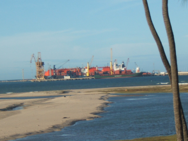 Praia do Pecém